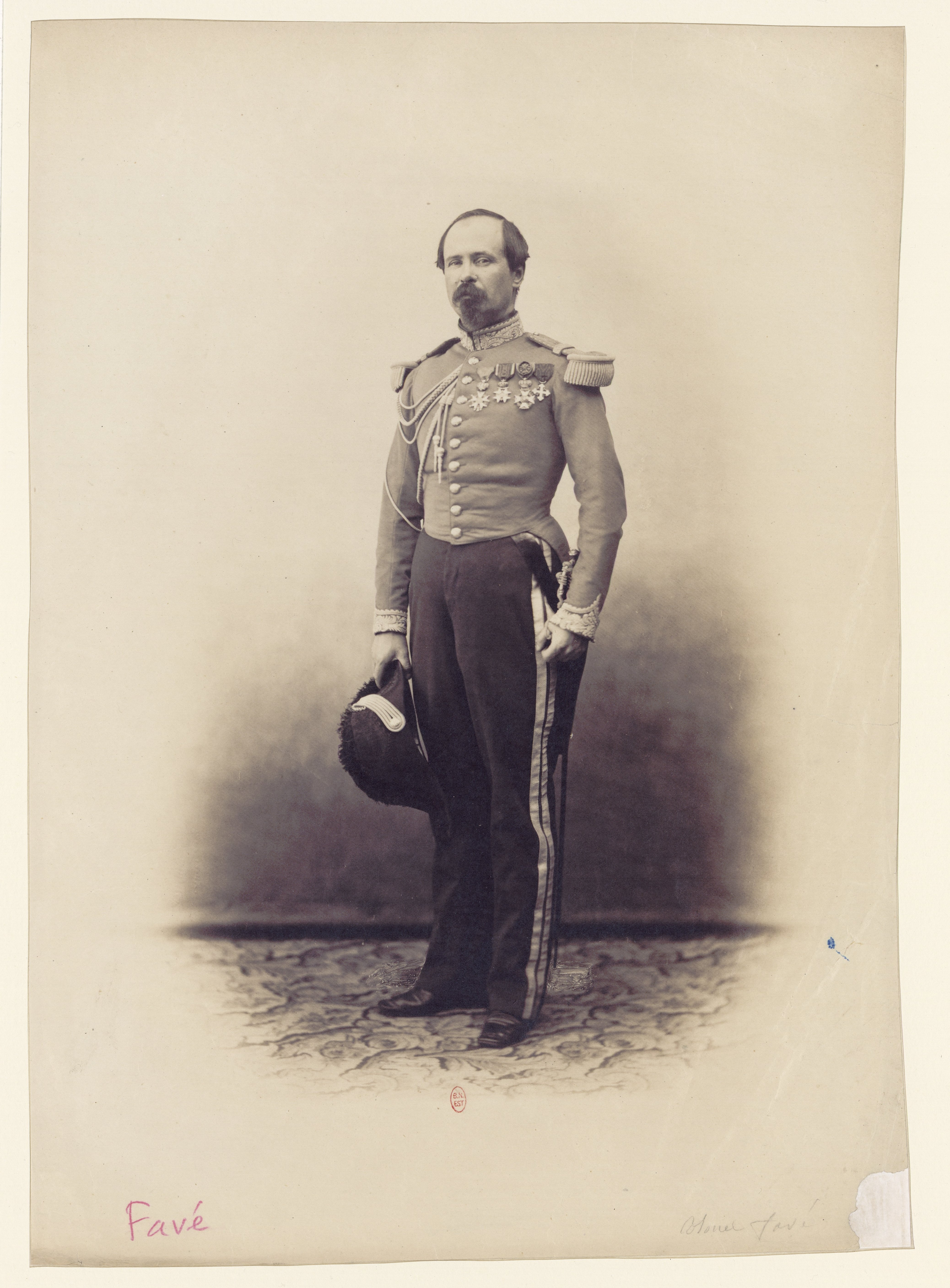 Portrait du colonel Favé.